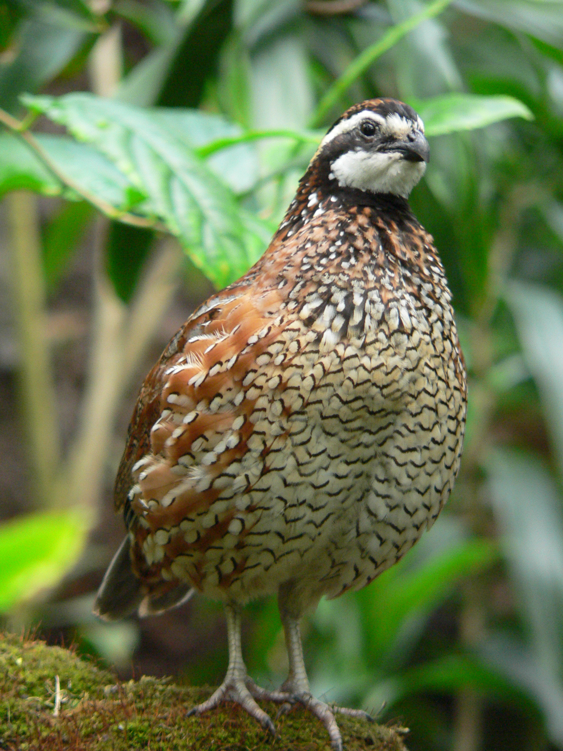 Virginiawachtel